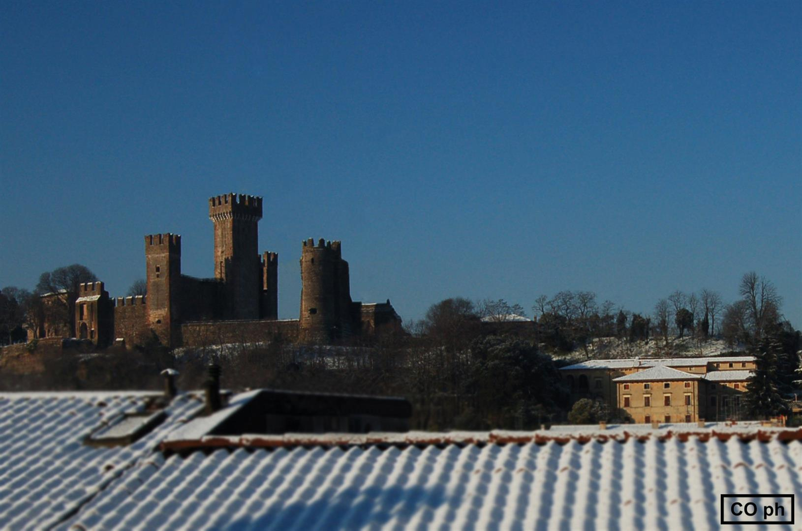 La Villa Gandini Zamboni con sulla destra il Castello Scaligero.